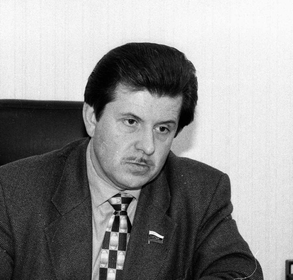 Сергей Алексеевич Вахруков во время «прямой линии» в редакции газеты «Коммунар» в Переславле. Сергей Алексеевич Вахруков — член Совета Федерации, председатель Ярославской областной думы (1996—2000), губернатор Ярославской области (2007—2012).